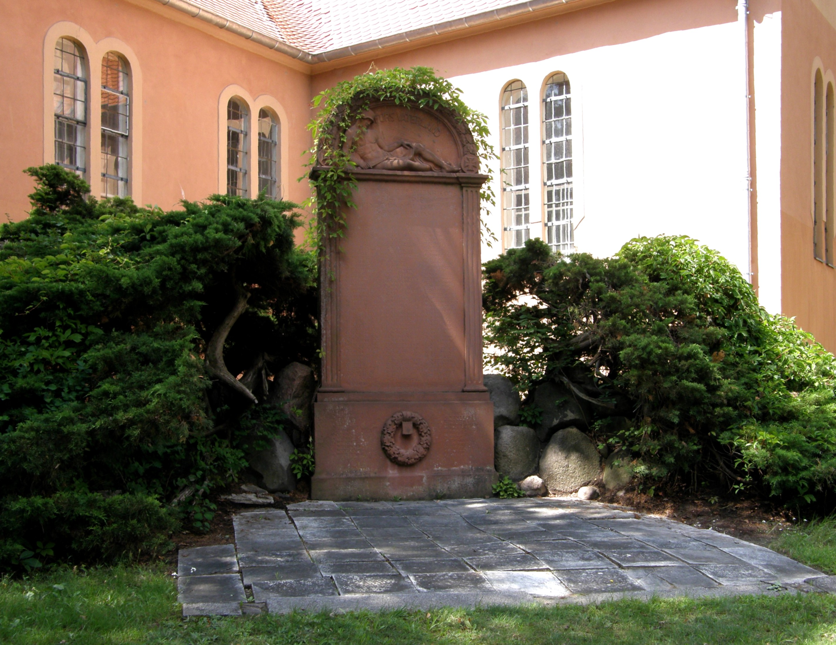 Falkensee, Ehrengrabstätte vor der Kirche Seegefeld